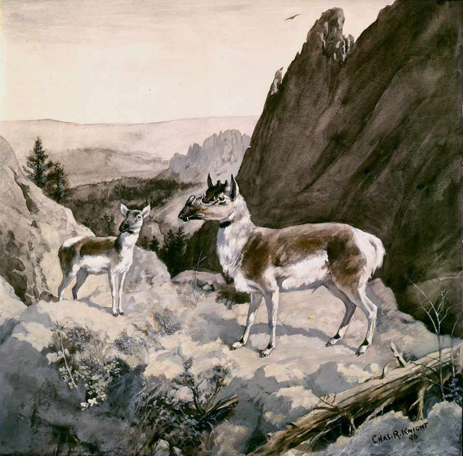 Protoceras